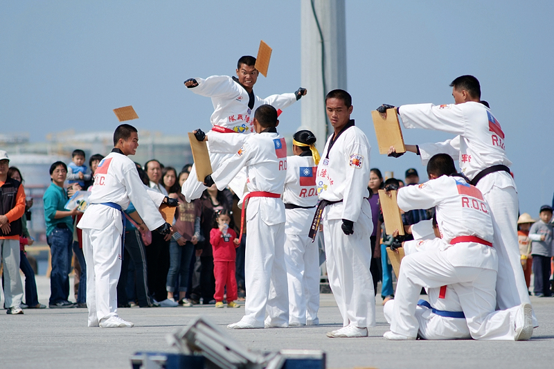 中華民國海軍98年敦睦遠航訓練支隊國內環島航訓，海軍陸戰隊莒拳隊表演飛踢擊破木板。